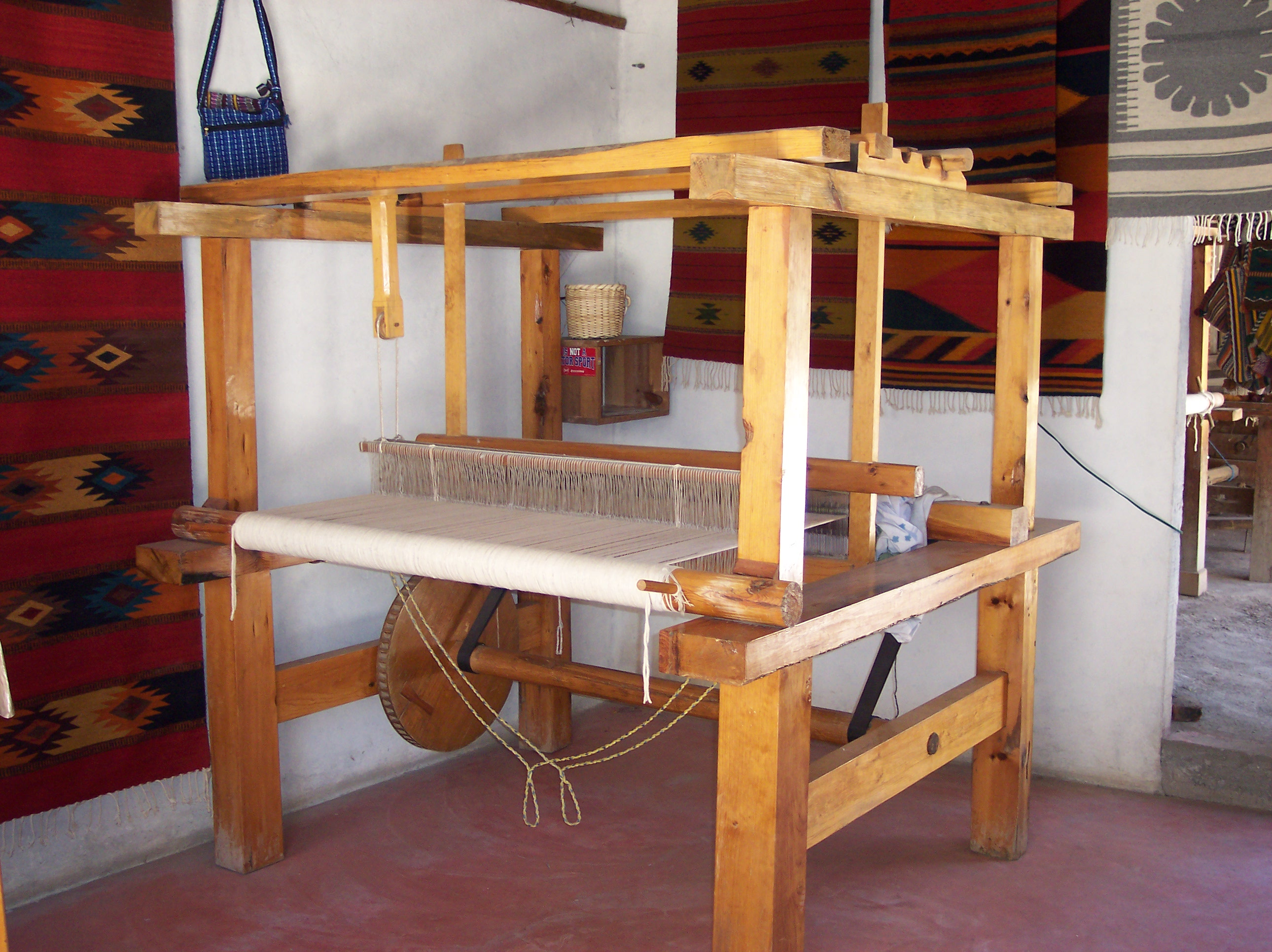 A tipical loom and coverlets in Teotitlán del Valle town. SPANSIH: Telar típico del pueblo y tapetes realizados. Located in: Teotitlán del Valle, Oaxaca. Mexico.